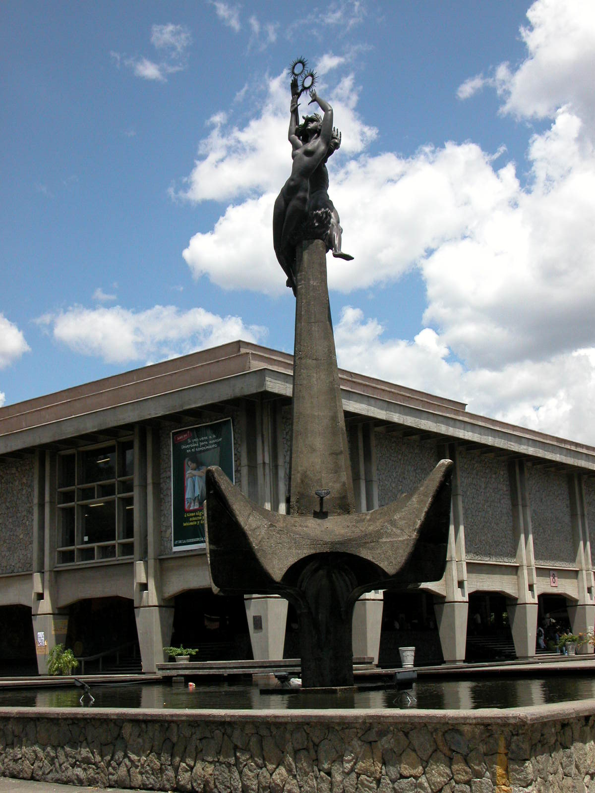 Hombre creador de energía de Rodrigo Arenas, Universidad de Antioquia. Medelln.Colombia